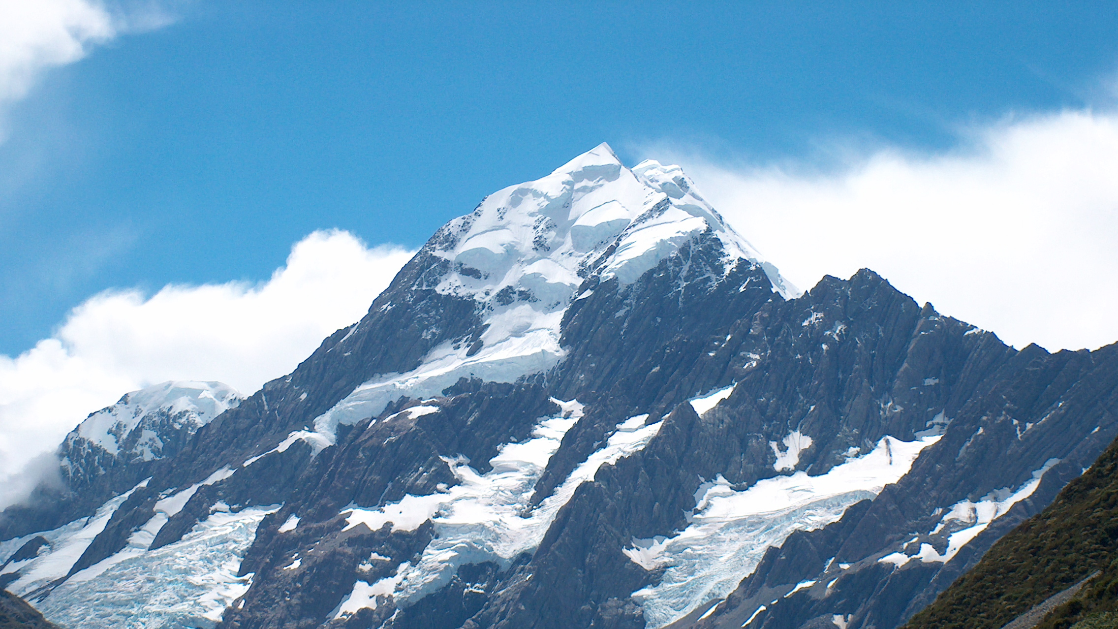 Monte Cook, en Nueva Zelanda. El Caradhras en las peliculas de El Señor de los Anillos